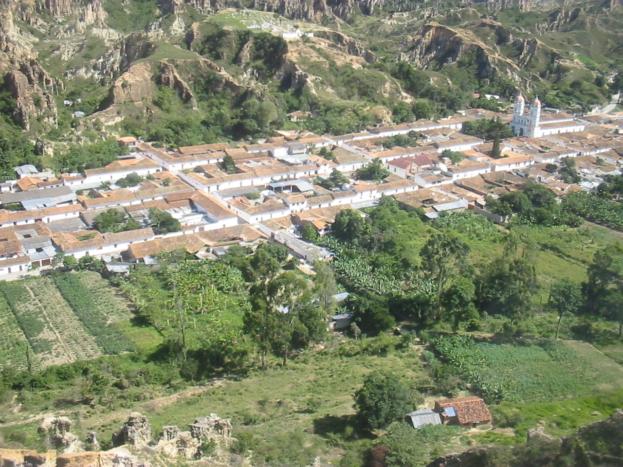 Foto aerea de la cabecera municipal de La Playa de Belén, Norte de Santander, Colombia.